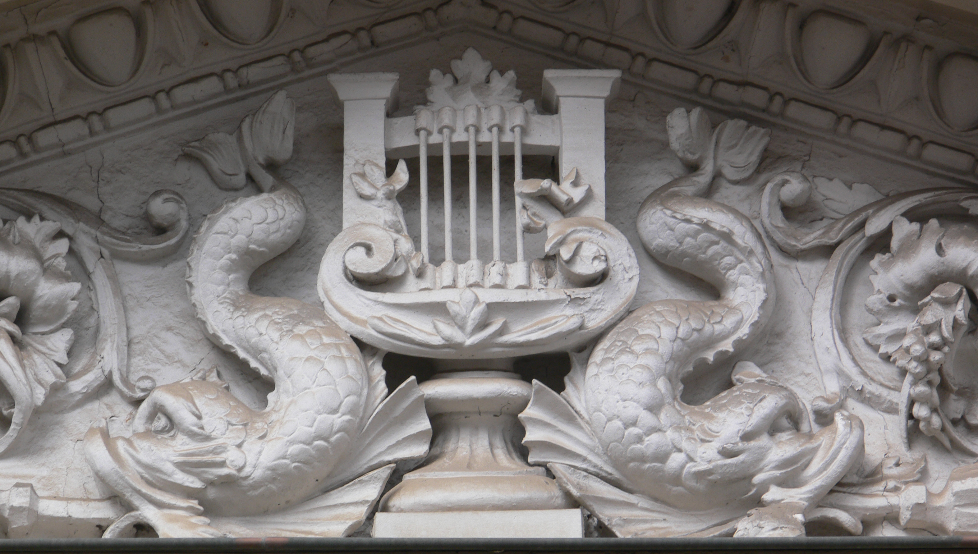 Alte Oper, Erfurt Relief am Haupteingang